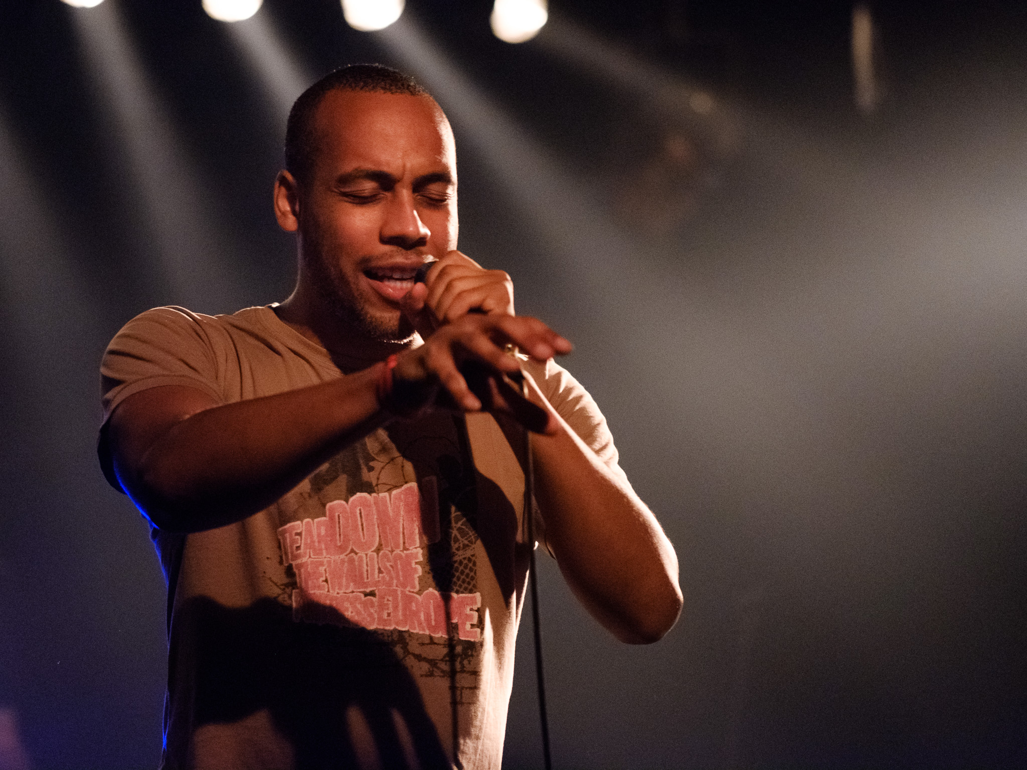 Amewu, deutscher Hip-Hop-Künstler, bei seinem Auftritt am 2017-09-29 in Vöcklabruck